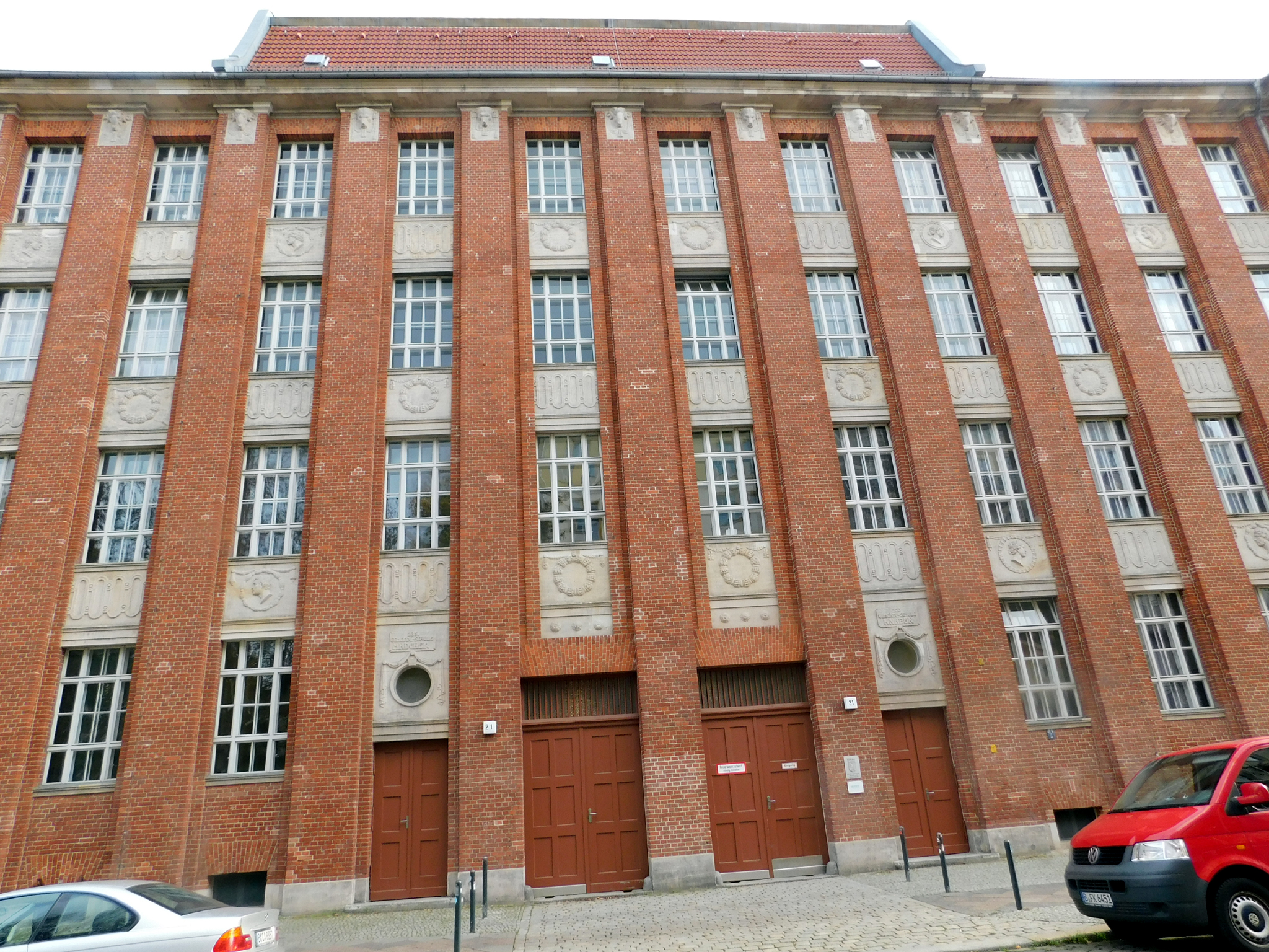 Für das Schulgebäude in der Lasdehner Straße hat der Architekt Ludwig Hoffmann die bedeutende Straßenfrontlänge (67 m) genutzt und einen Baukörper konzipiert, dessen kunstvoll strukturierte Fassade eine starke architektonische Wirkung entfaltet. Die Vorderfront ist in 18 senkrechte Achsen unterteilt, wobei zwischen den vom Straßenpflaster bis unters Dach vorstehenden Wandpfeilern die vertikalen Achsen der Fenster mit den ornamentierten Fensterbrüstungen zurücktreten. Die Schmuckelemente der Fassade schuf der Bildhauer Georg Wrba (1872–1939).